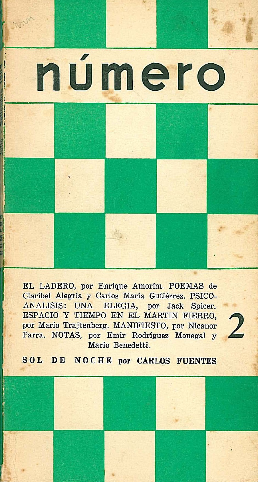 Portada de la segunda época de la publicación literaria de Urguay "Número".